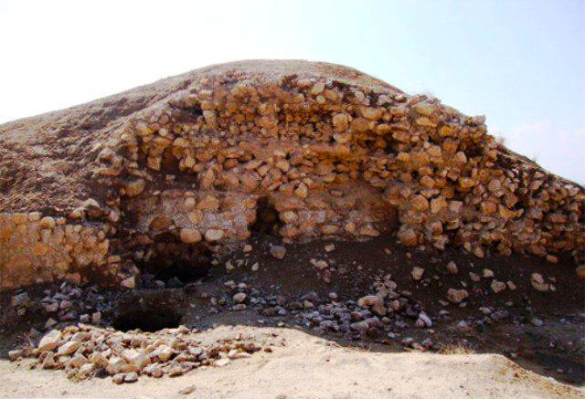 تصاویری از قصر ابونصر